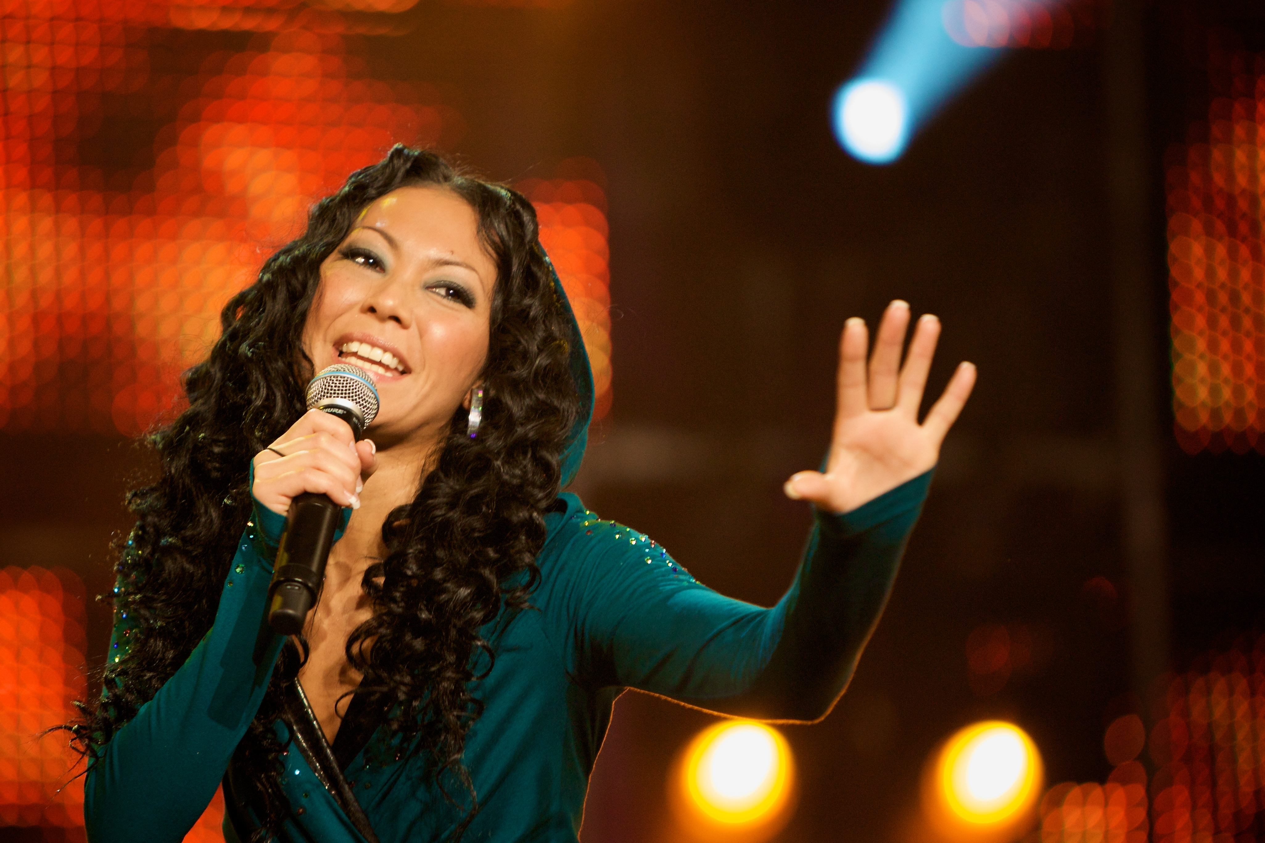 Belinda Braza